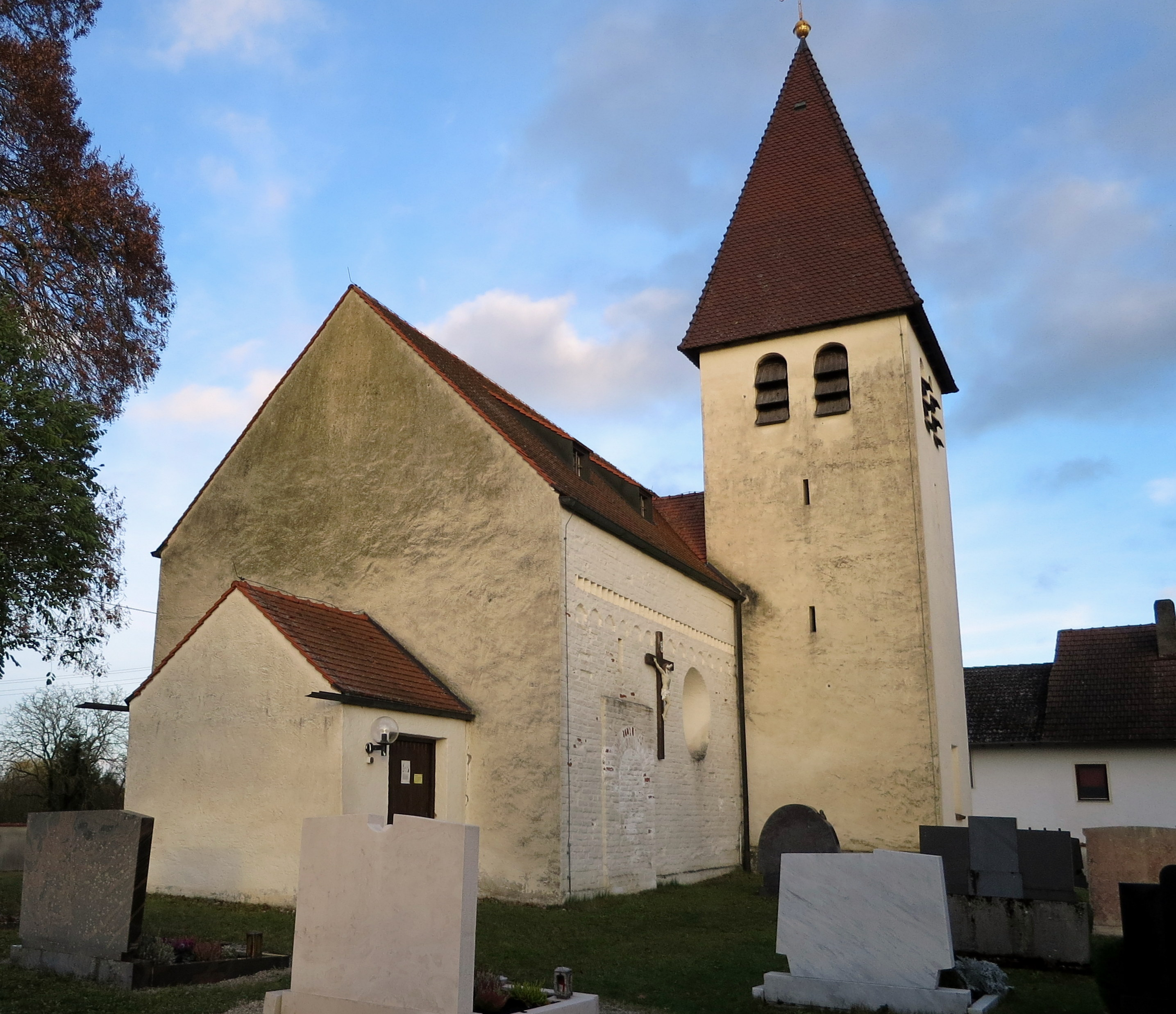 Katholische Filialkirche St. Petrus Romanischer Saalbau mit gotischem polygonal schließendem Chor des 15. Jahrhunderts